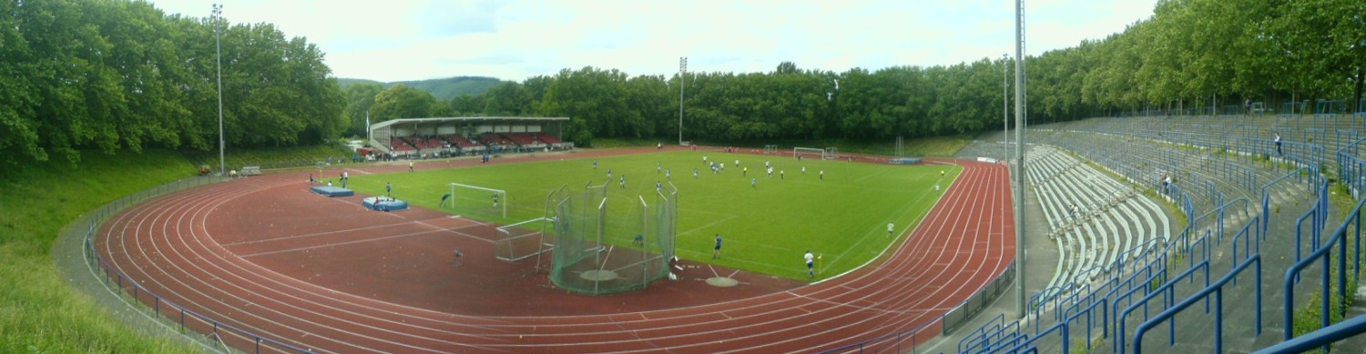 Hagens größtes Stadion bietet ein Fassungsvermögen für 16.500 Zuschauer.